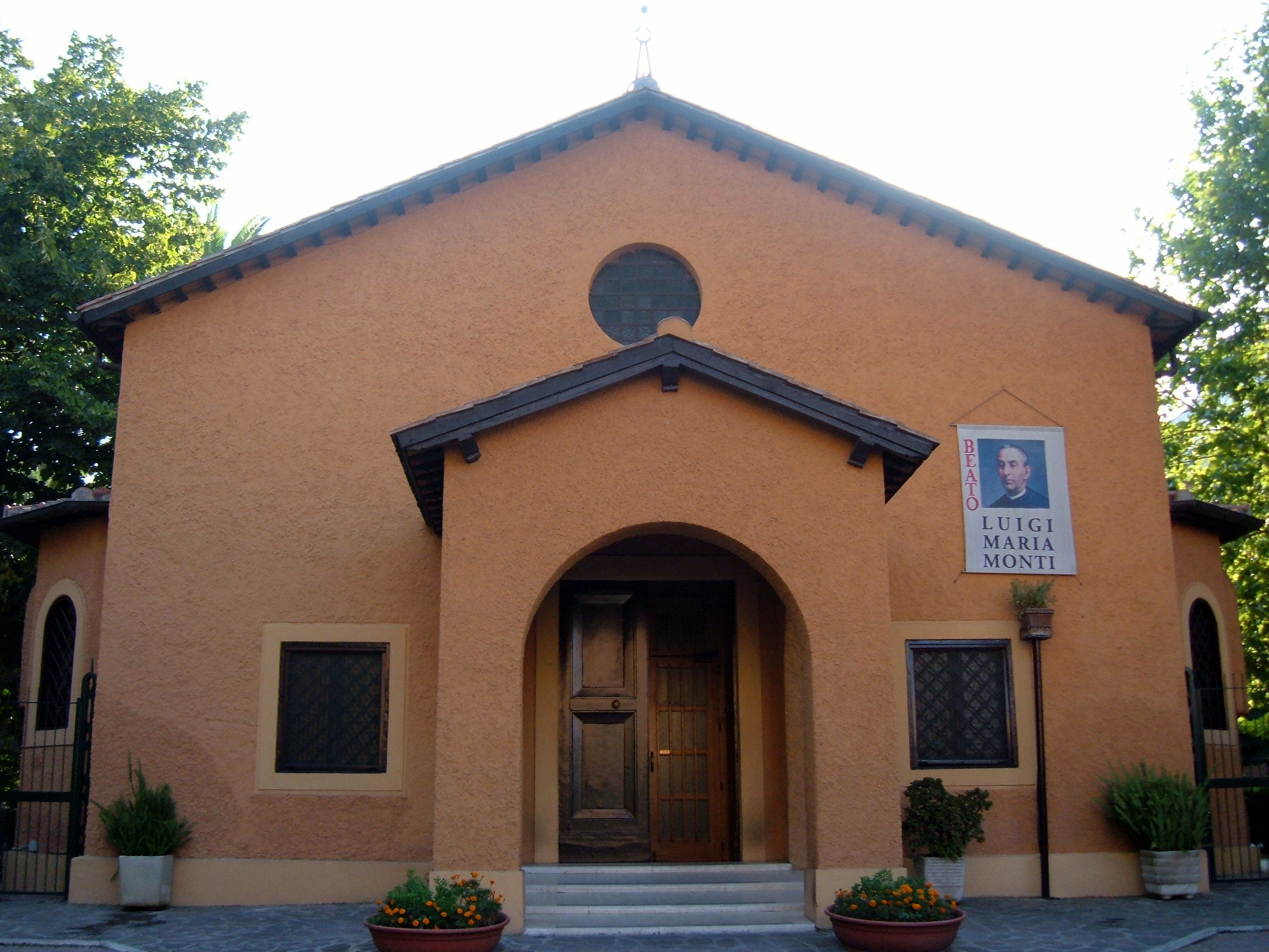 Chiesa di San Leone, a Roma, nel quartiere Aurelio, in via Boccea.